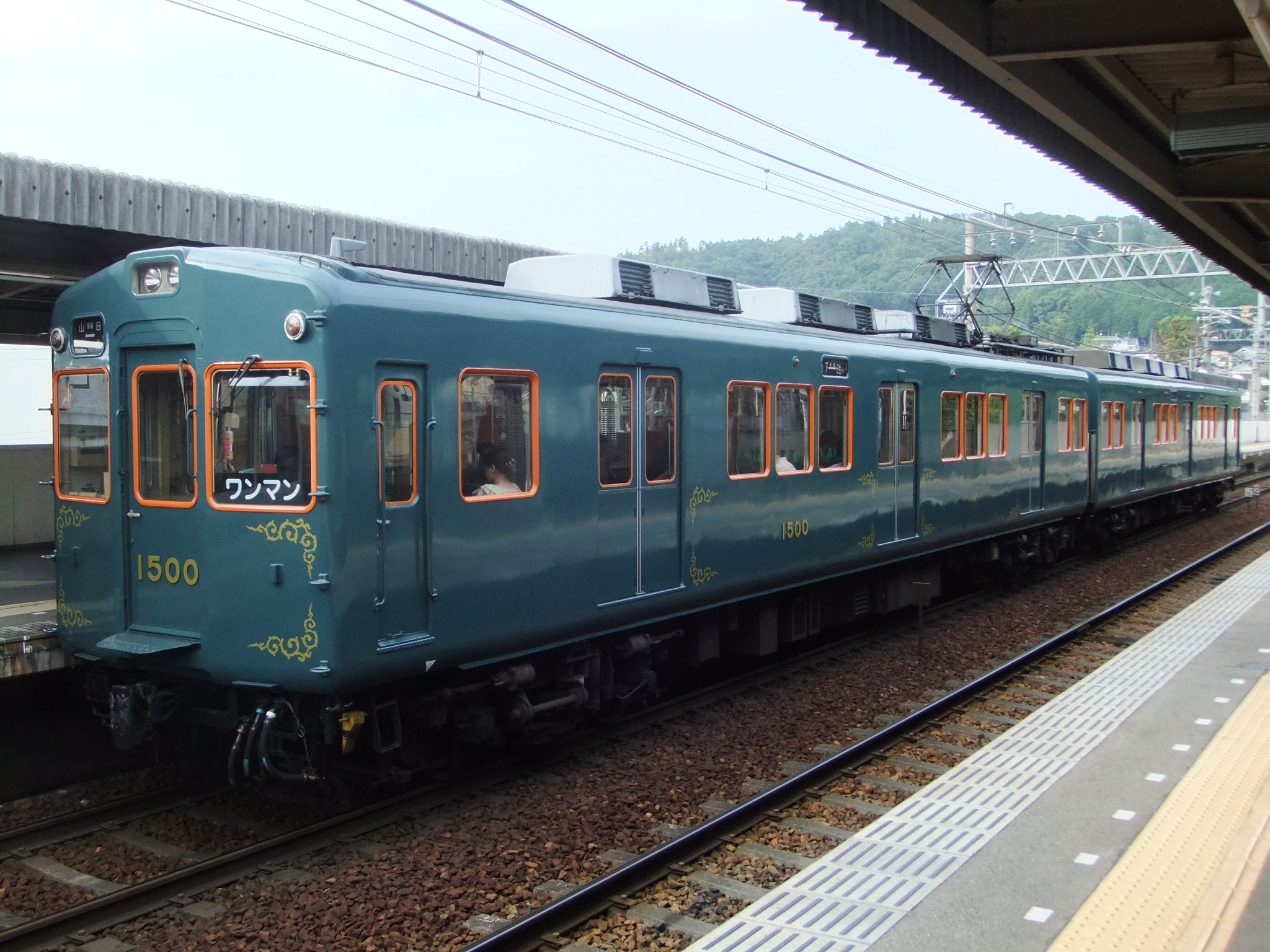 能勢電鉄開業100周年記念 1型復刻塗装車両（窓枠塗装後）